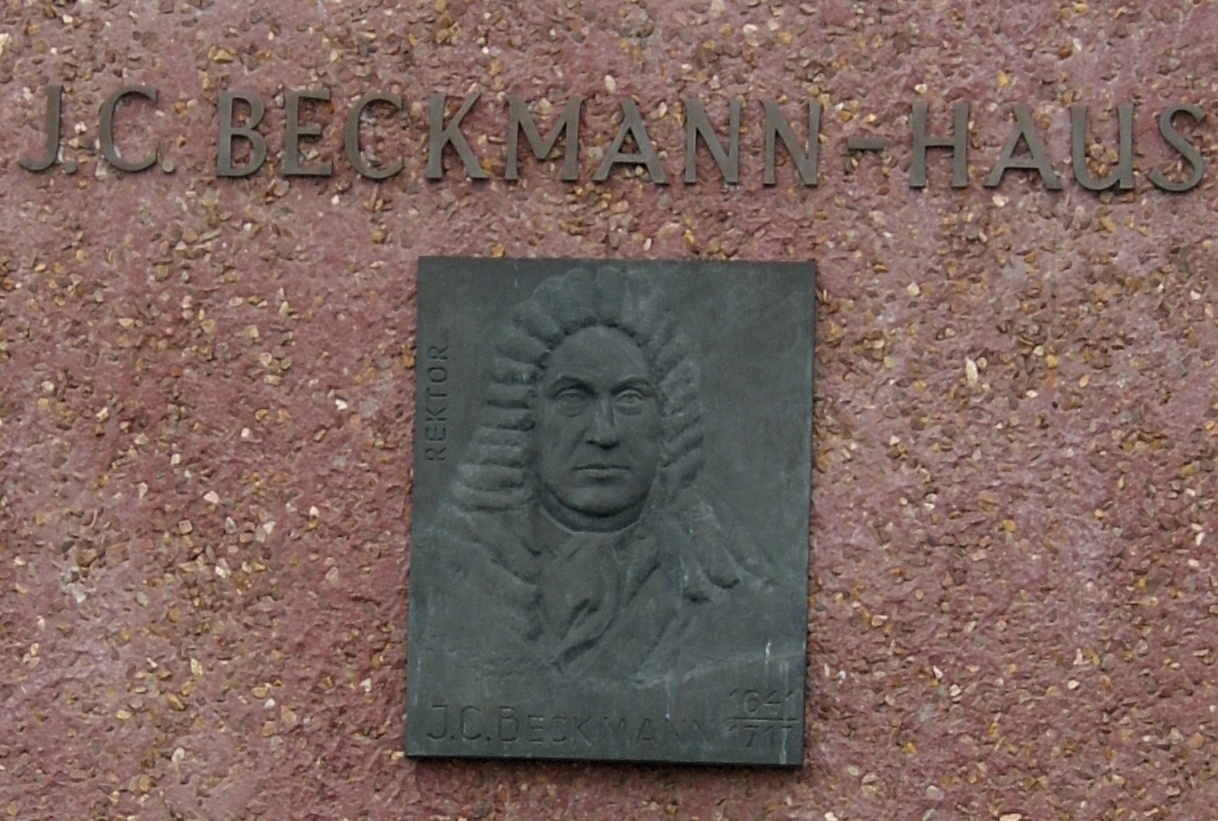 Schild am Wohnhaus in Frankfurt (Oder) im Studentendorf Mühlenweg. Dargestellt ist Johann Christoph Beckmann (1641-1717)